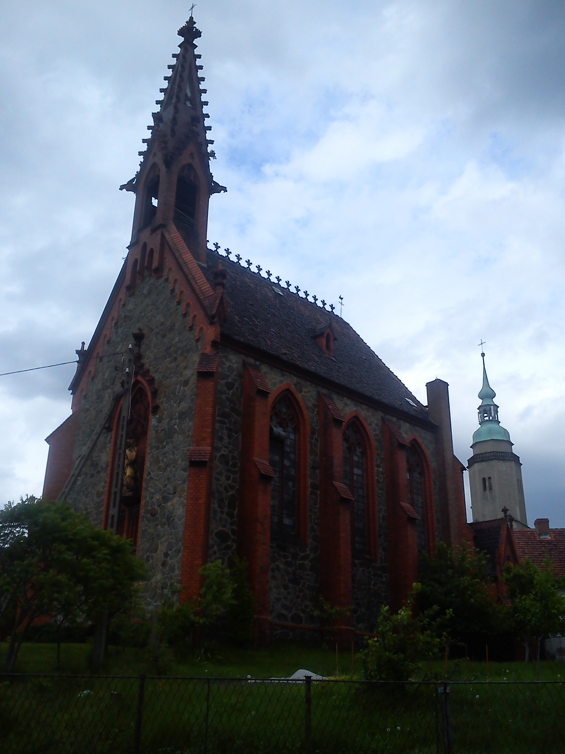 Neogotycki kościół Św. Krzyża z 1867 roku.